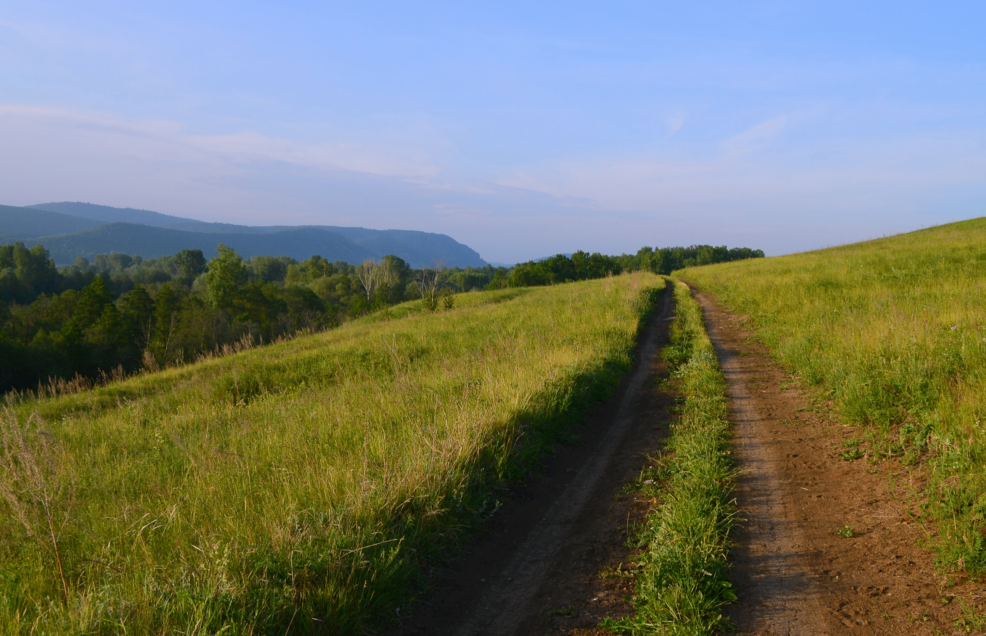 дорога по склону горы Ияртау 382.7 м. ( в сторону Гумерово